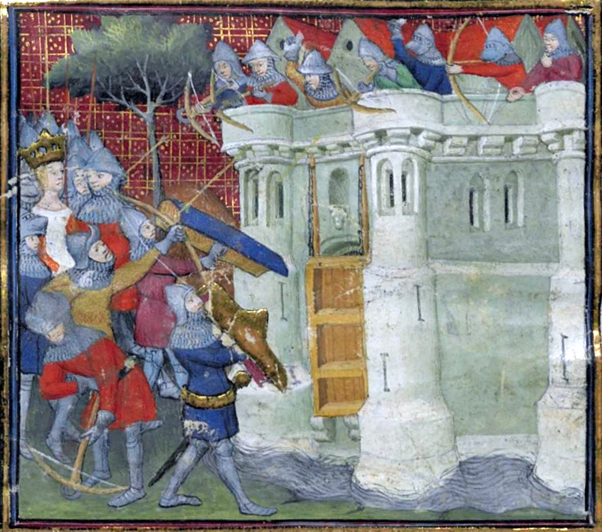 Siège de Bristol in 1326 by Queen Isabella where Edward II, his counselors and favorites (the Despensers) have taken up refuge. (Panel 4 of BnF MS fr 2663 f.6r) (1326)